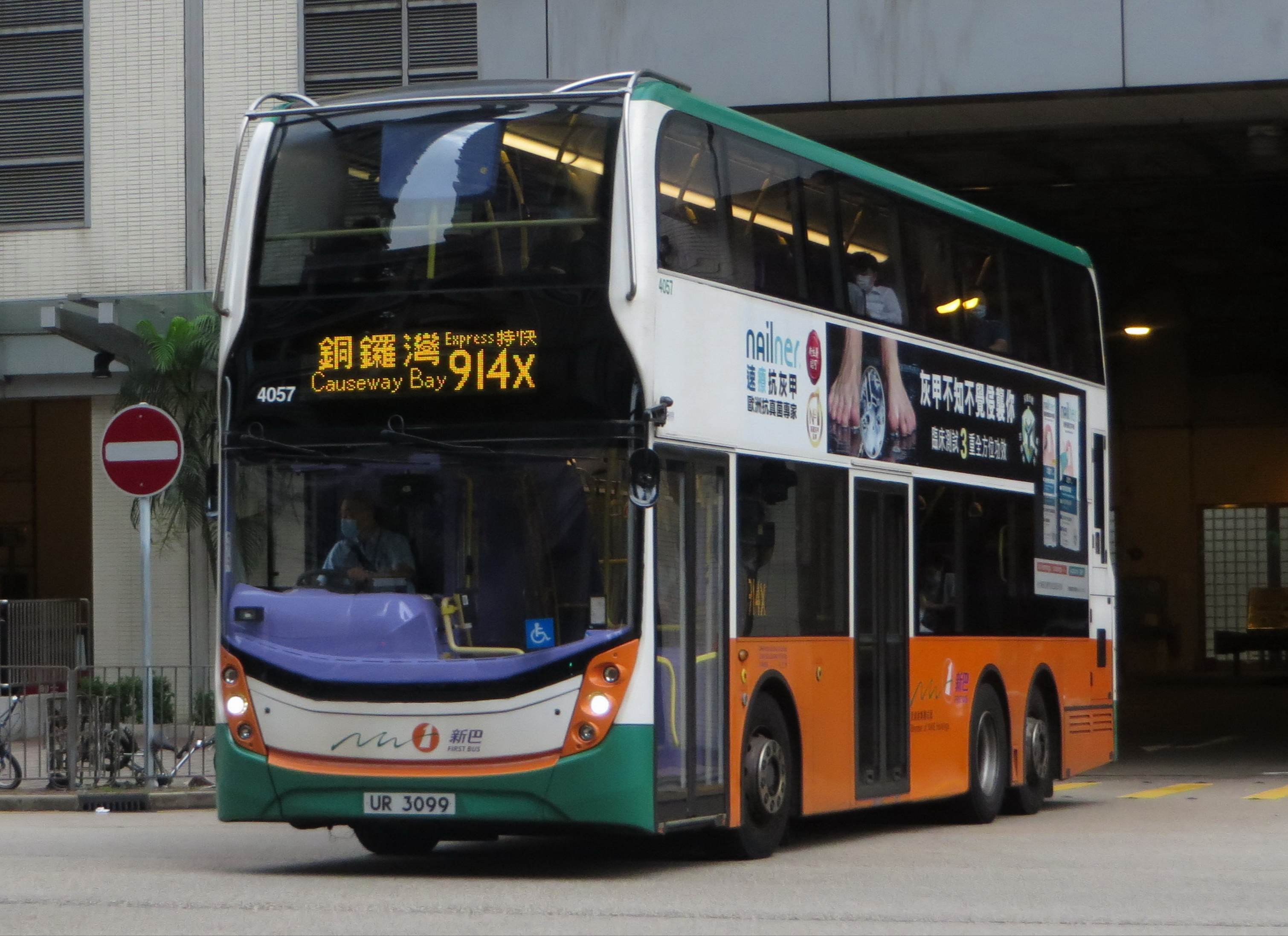 中文（中国大陆）: Trident E500 Turbo 4057